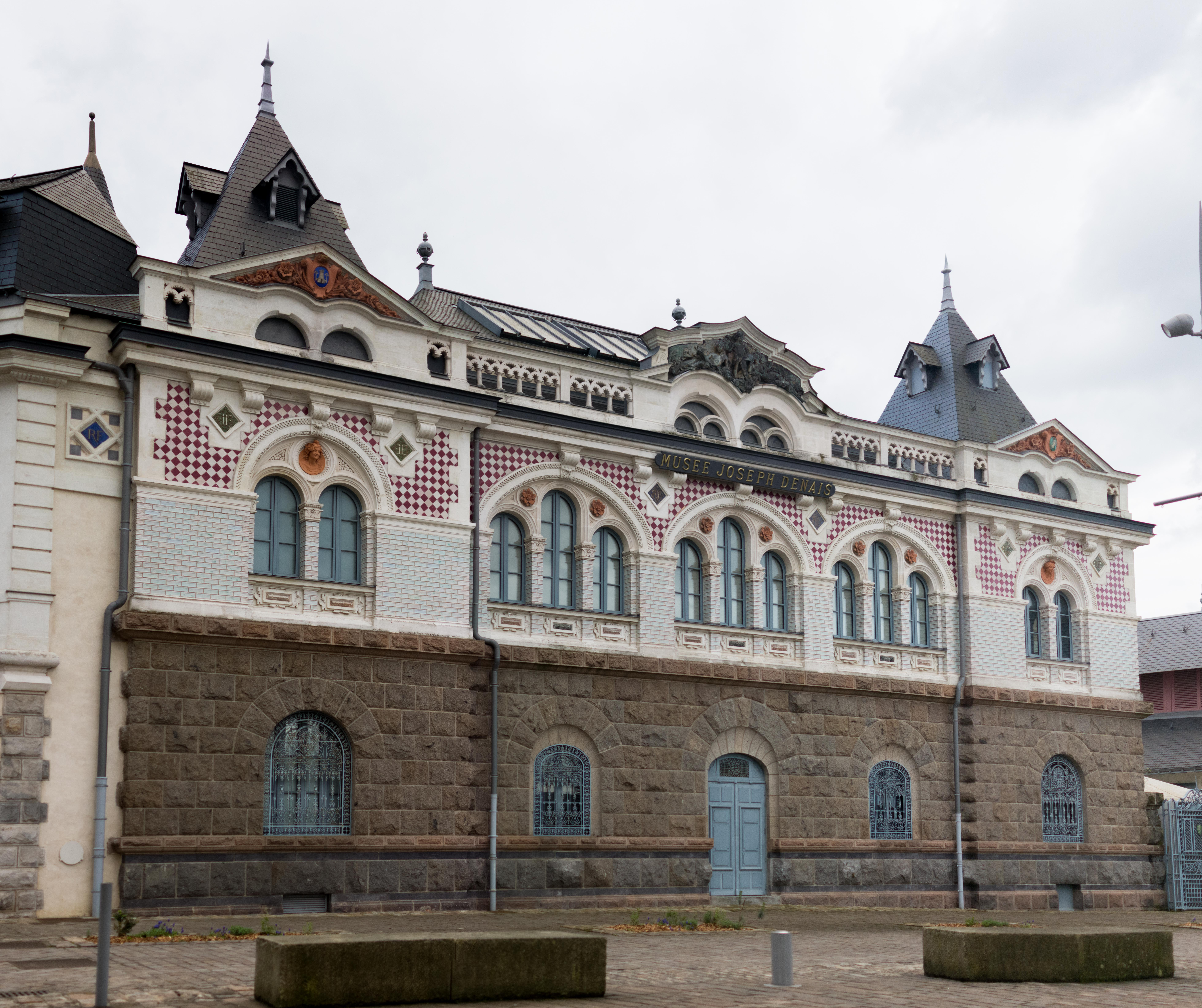 Façade sud du musée Joseph-Denais.